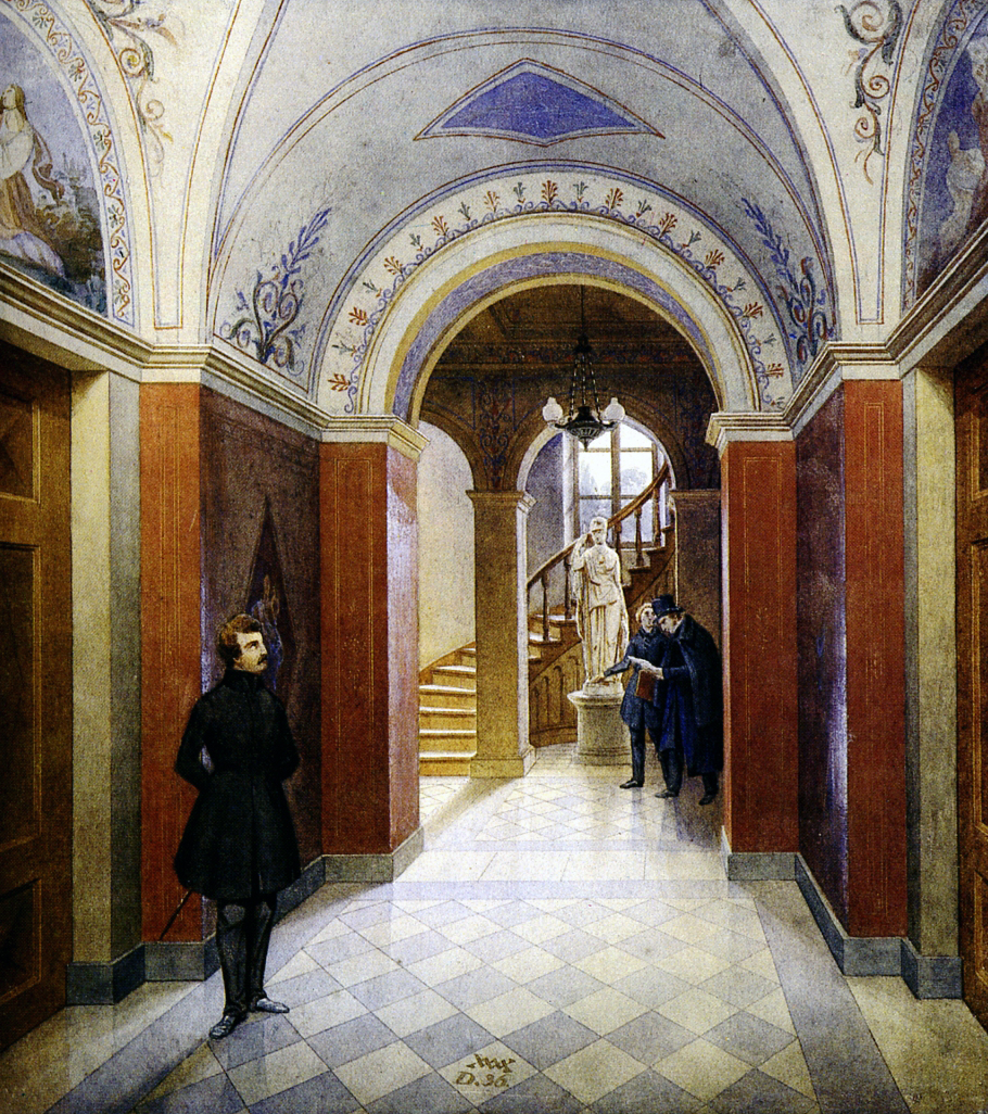 Flur im Wohnhaus von Friedrich Wilhelm von Schadow in Düsseldorf am Flinger Steinweg (heute Schadowstraße. Aquarell von Rudolf Wiegmann 1836. Im Vordergrund Rudolf Wiegmann, der Architekt des 1838 fertiggestellten Hauses, im Hintergrund Friedrich Wilhelm von Schadow mit einem Besucher.